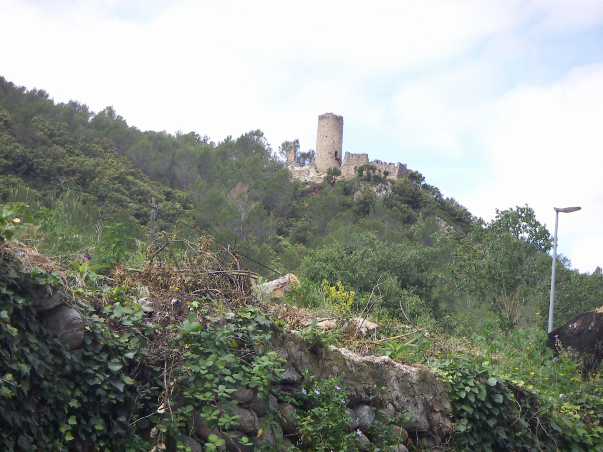 Castell de les Escaules (Alt Empordà, Catalunya)